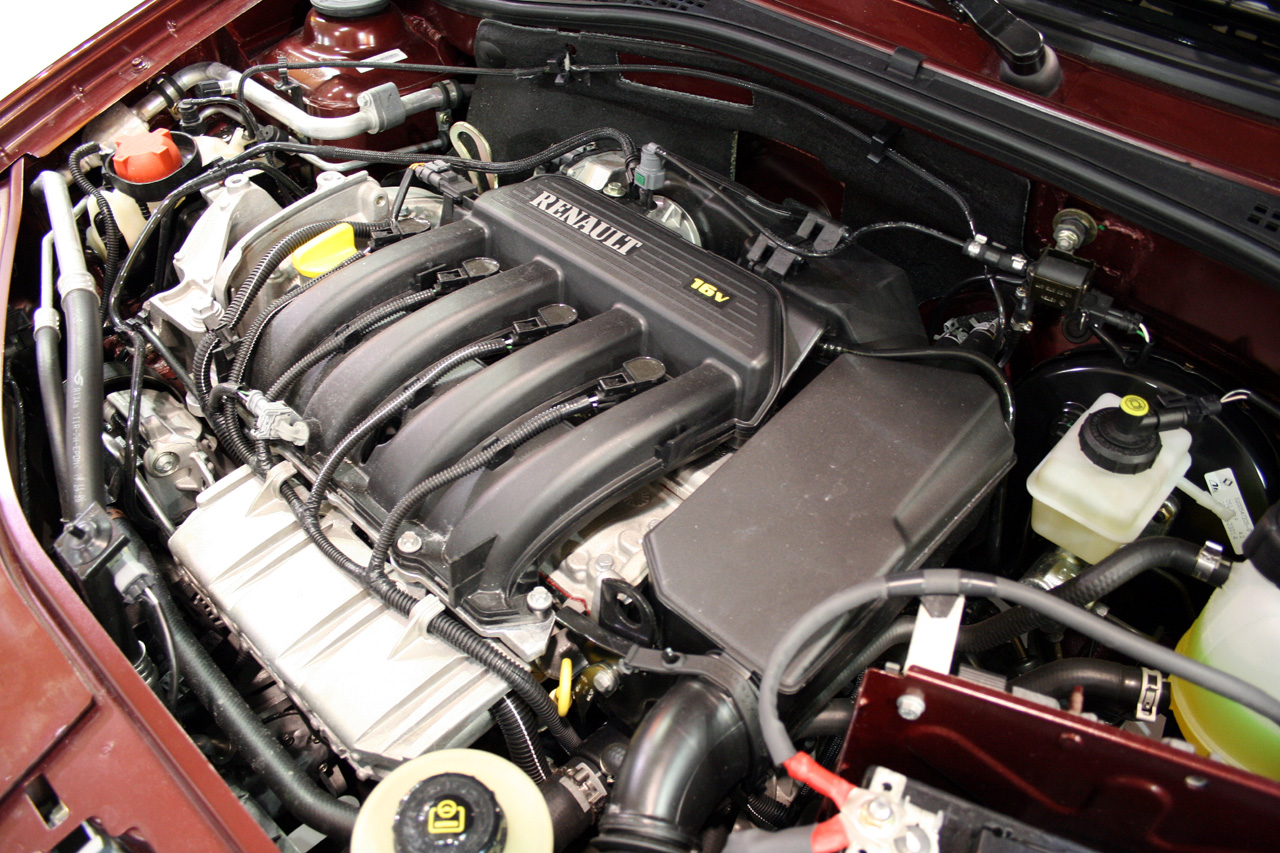 Engine of Renault Logan, made in São José dos Pinhais-PR, Brazil.